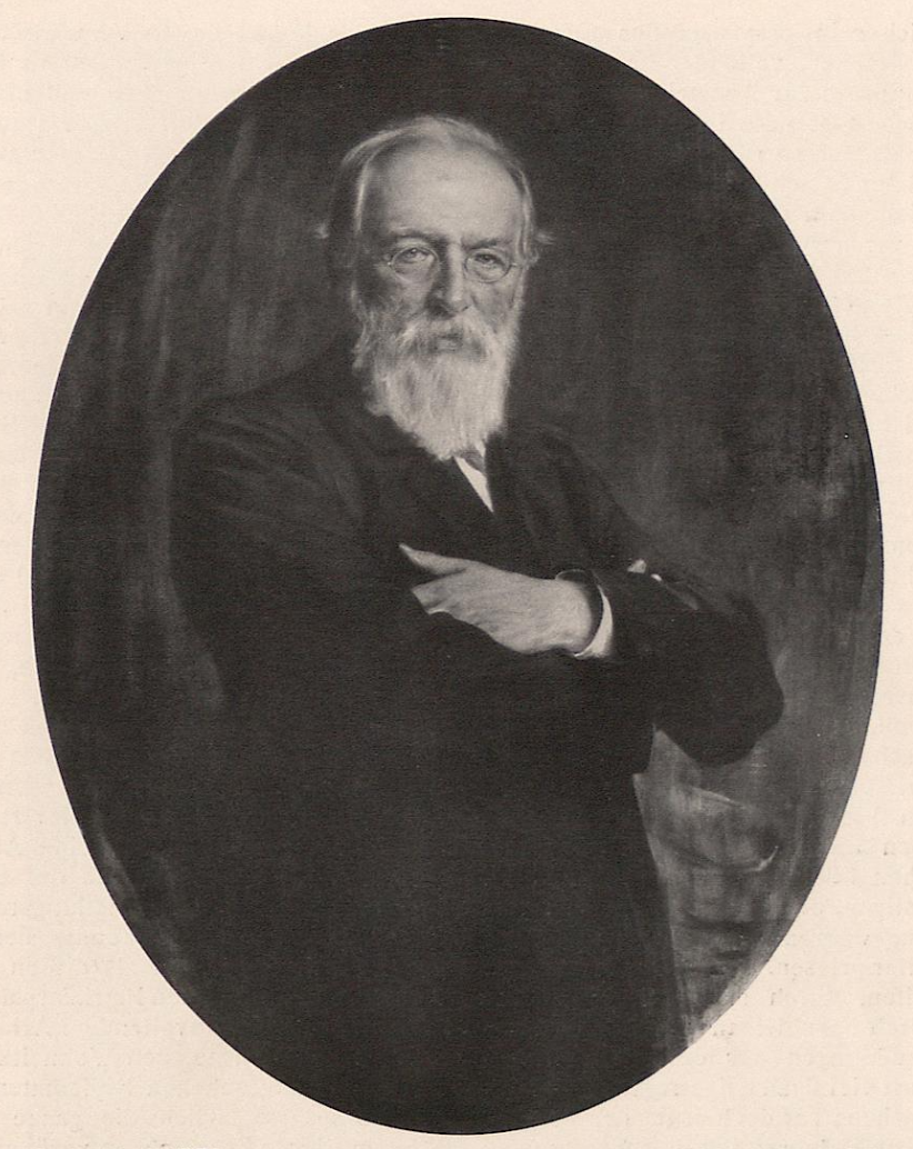 Caspar Ritter: Minister August Eisenlohr, c. 1899